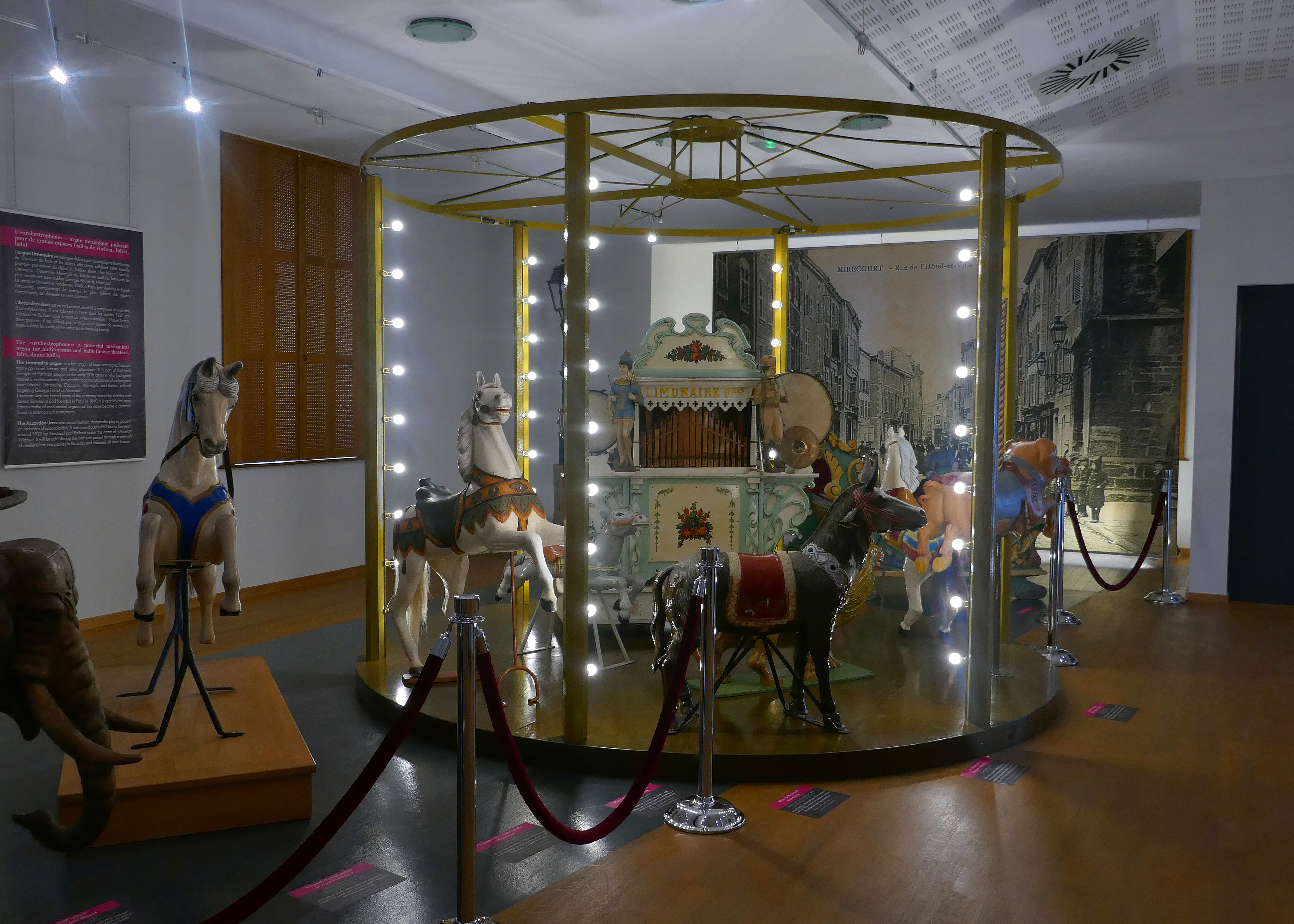 Exposition temporaire "Fête foraine, carrousel et limonaire" à la Maison de la musique mécanique et de la dentelle à Mirecourt